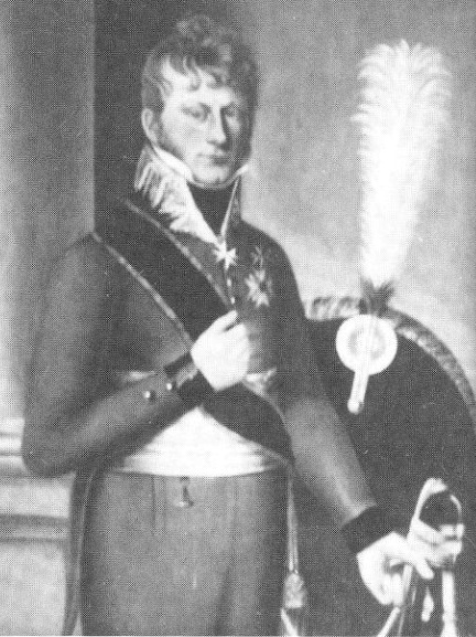 Count Joseph Carl († 1831), Graf Joseph Carl zu Ortenburg-Tambach